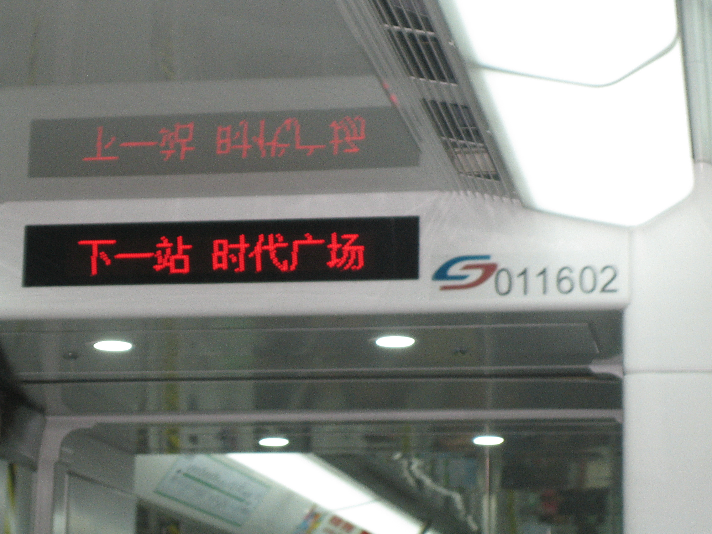 中文（中国大陆）: 苏州轨道交通1号线列车上的显示屏